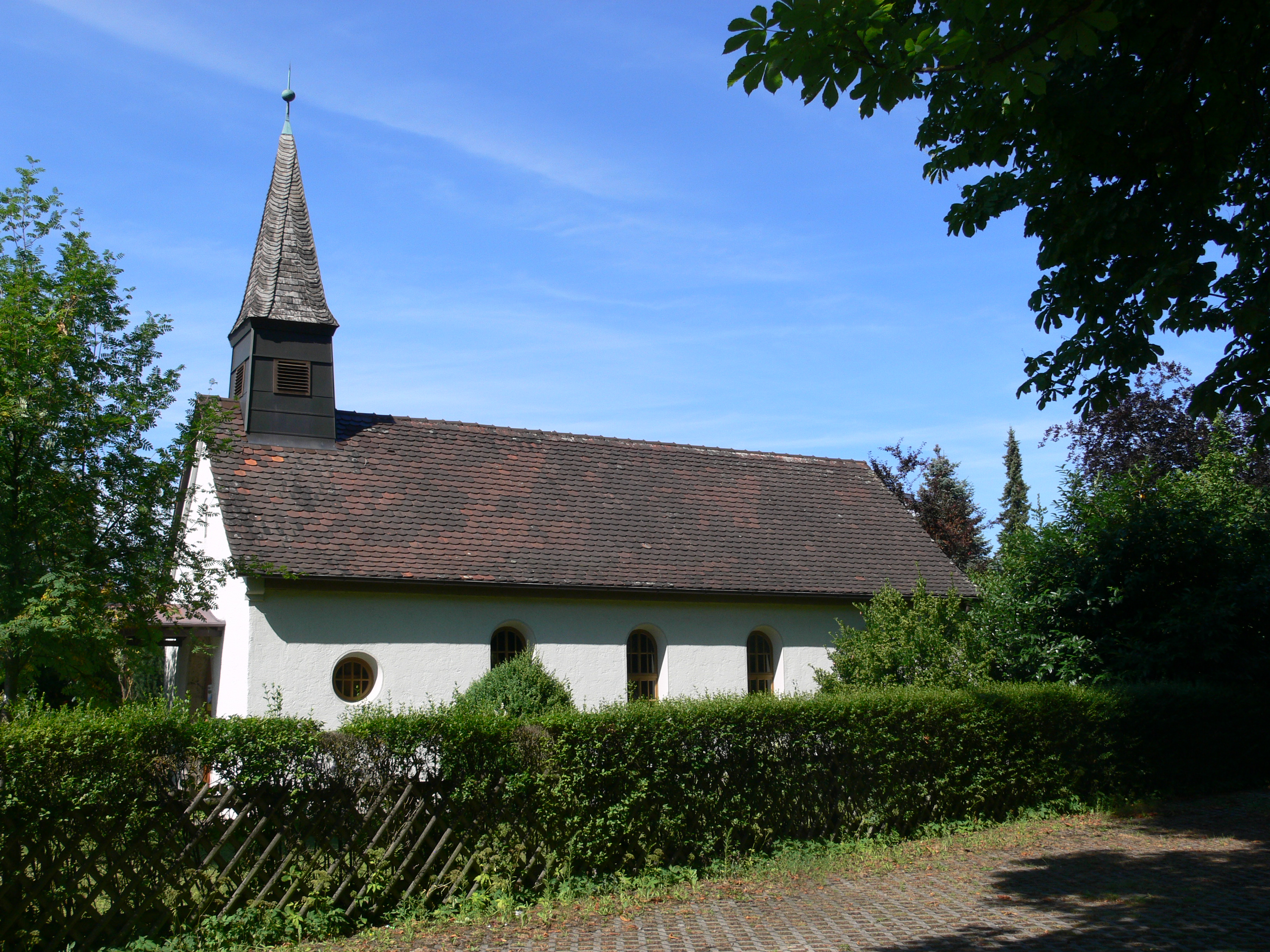 Ailingen, Stadt Friedrichshafen, Bodenseekreis: Evangelische Kirche